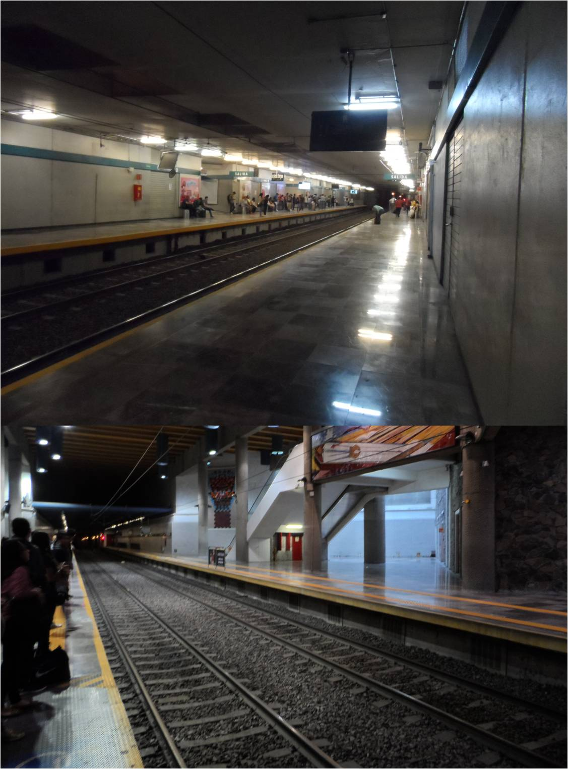 La estación "Juárez del Tren Ligero de Guadalajara" (Arriba: la estación en la Línea 1. Abajo: la estación en la Línea 2).